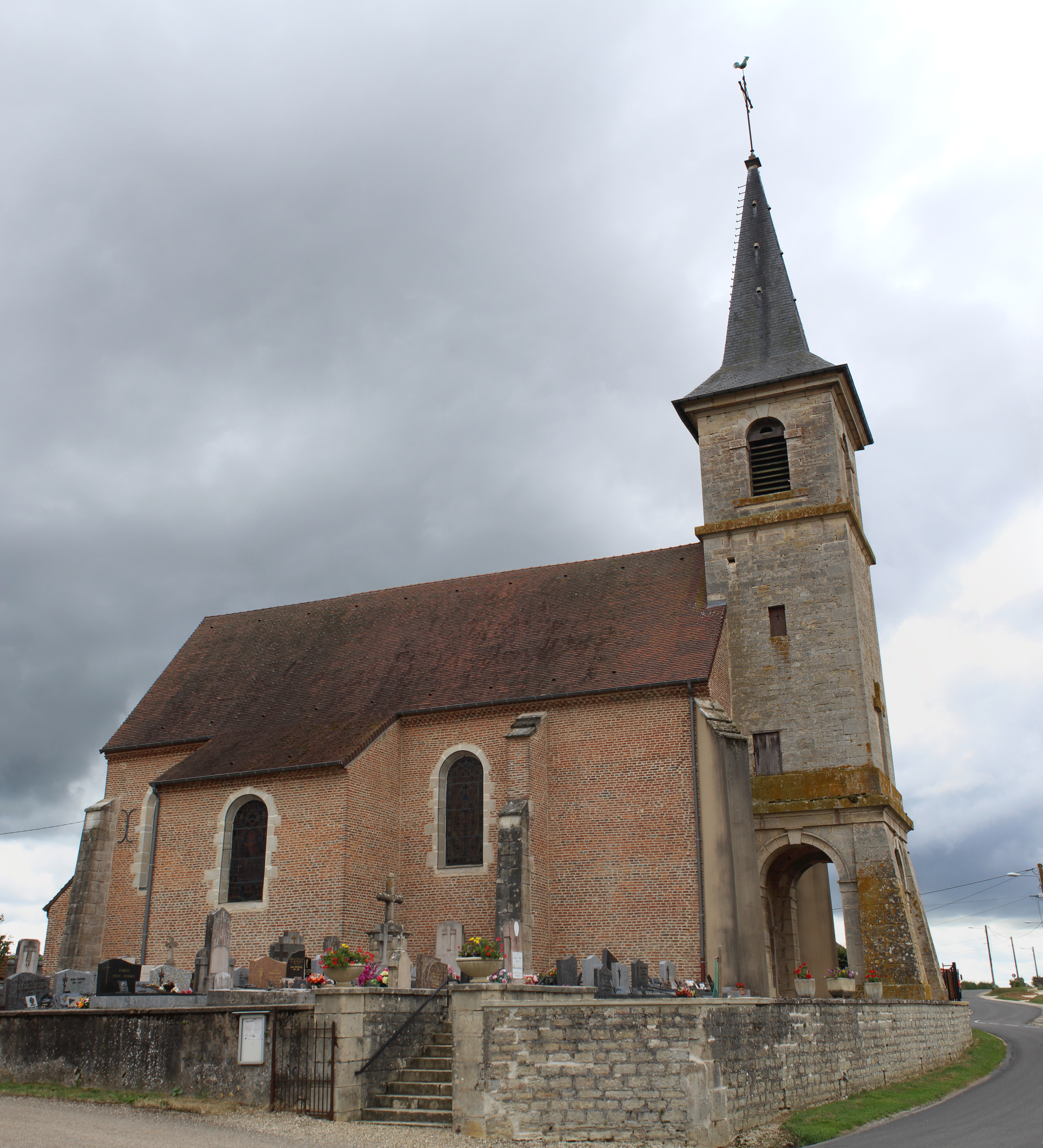 Église Saint-Bénigne de Saint-Baraing.